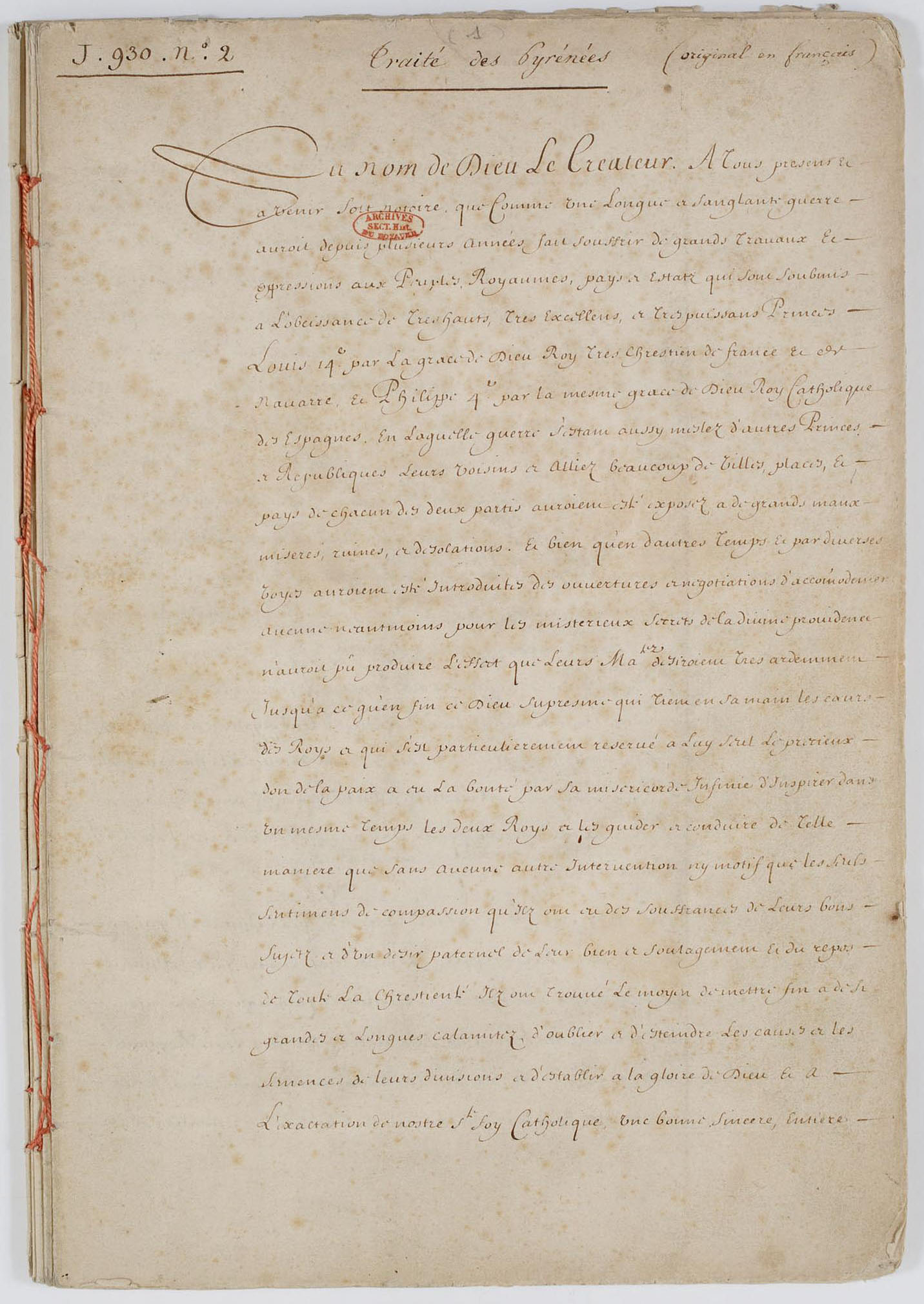 Traité des Pyrénées signé par le cardinal Mazarin et Luis de Haro et mettant fin à la guerre entre la France et l'Espagne qui durait depuis 24 Ans.